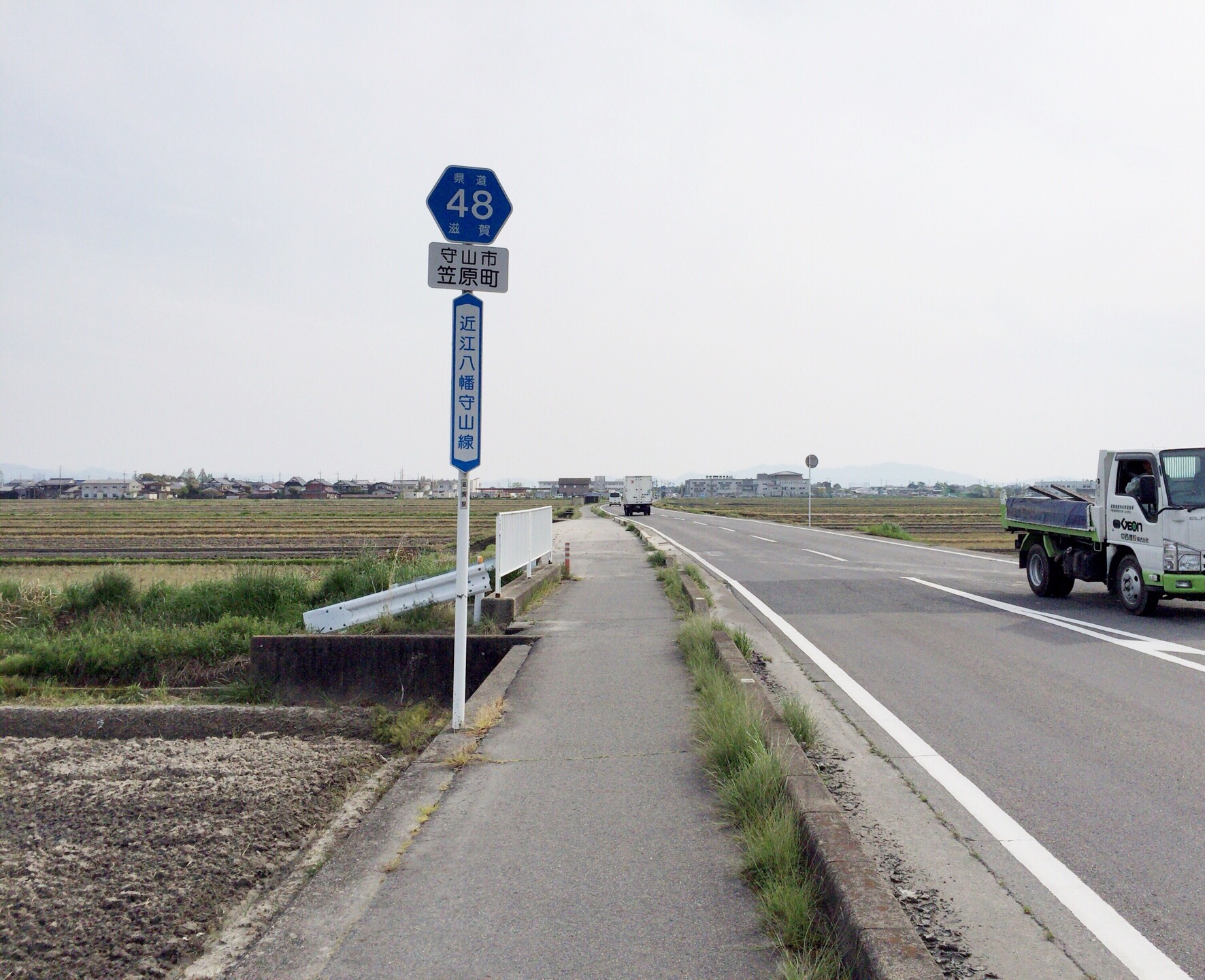 滋賀県道48号近江八幡守山線で、守山市笠原町